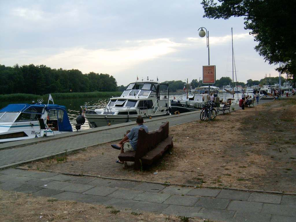 Dziwnów - przystań rybacka